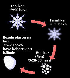 Özgün resim üzerine Türkçeleştirildi.